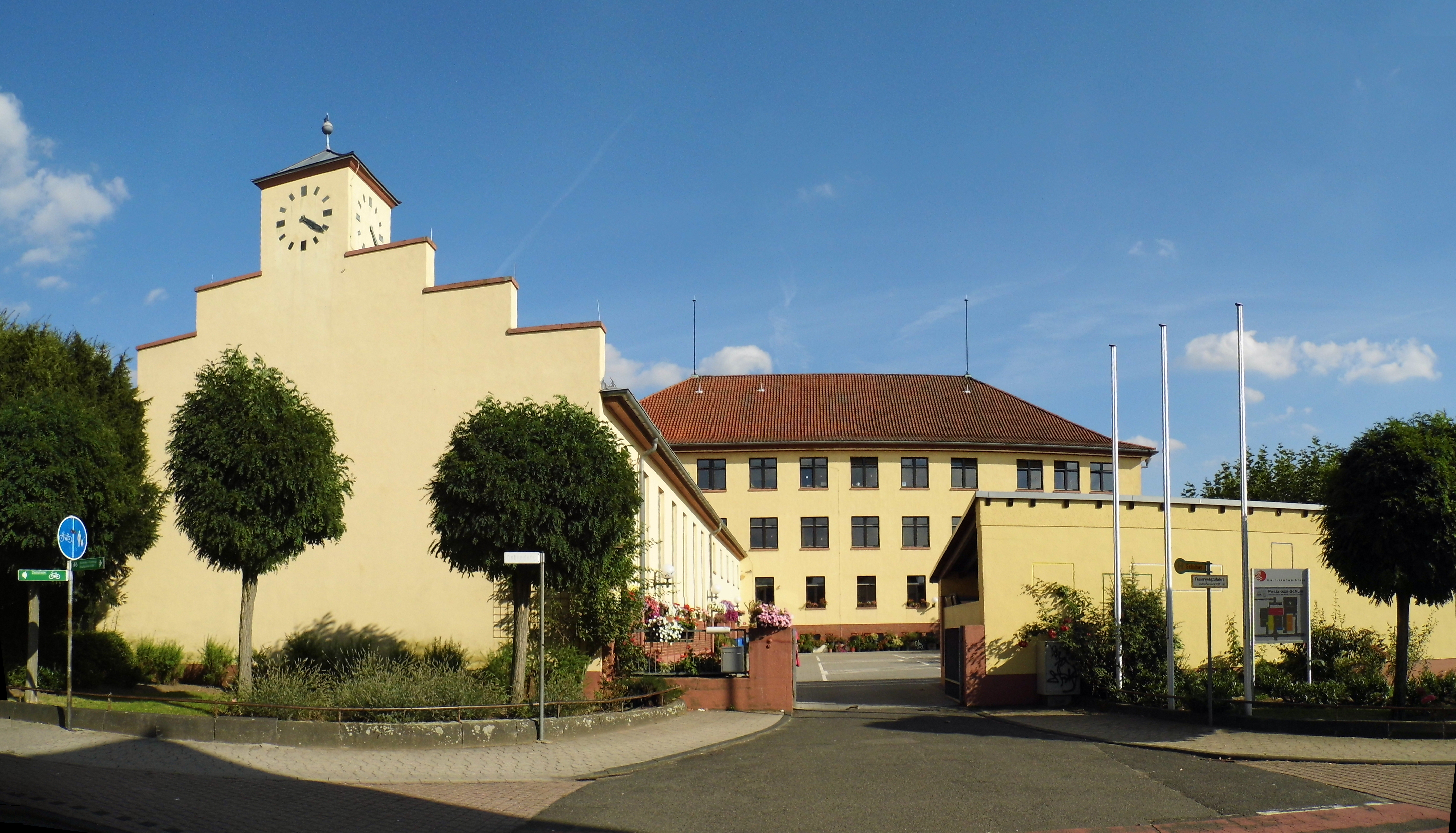 Hofheim, Pestalozzi-Schule